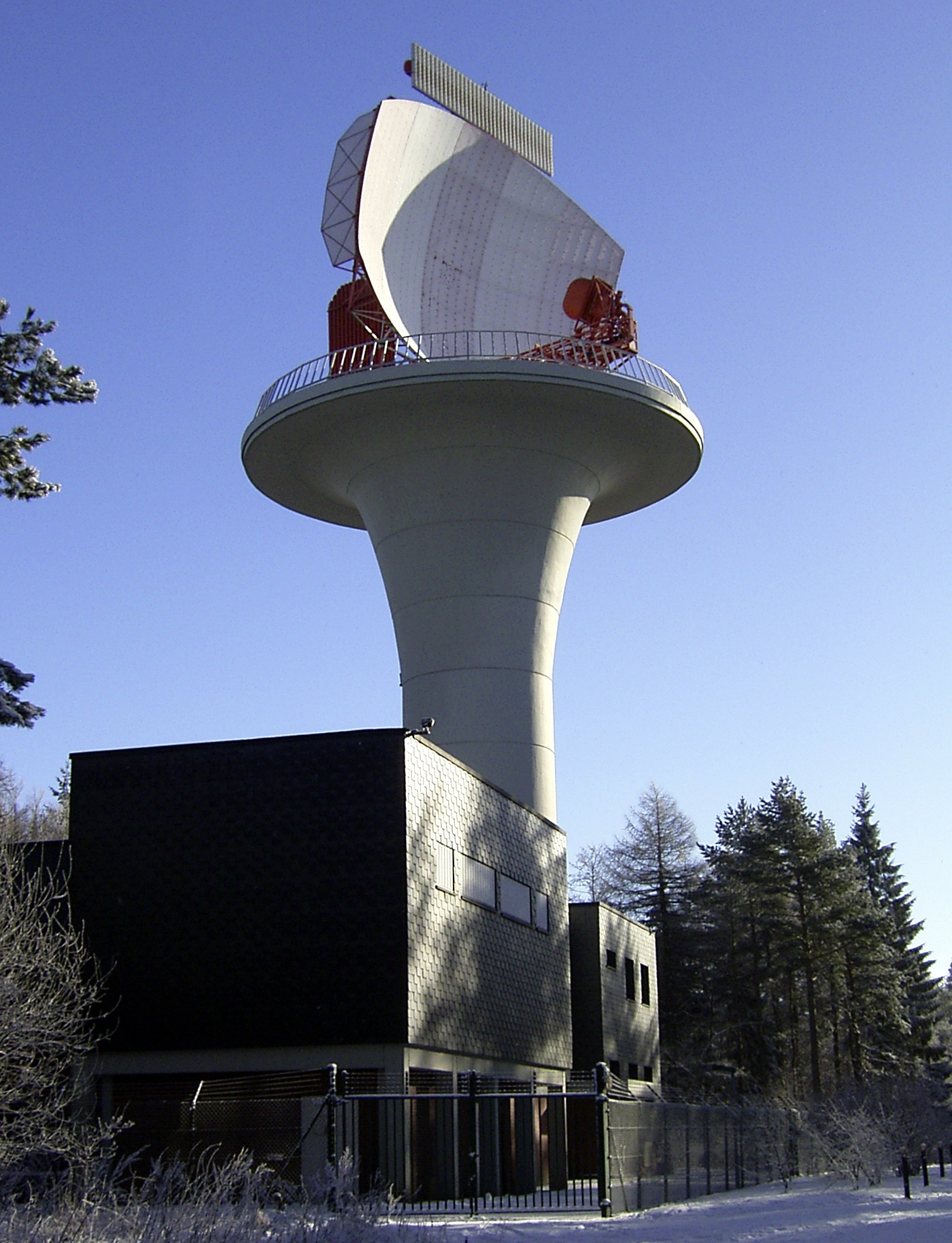 Flugsicherungsanlage im Deister Copyright: GNU FDL FlugsicherungDeister.jpg (für die GNU FDL)